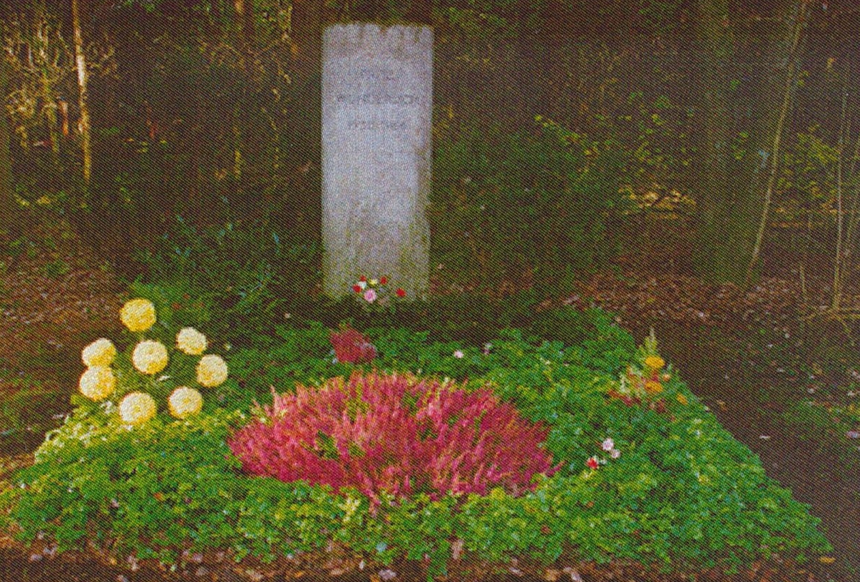 Waldfriedhof München-Fritz Wunderlich